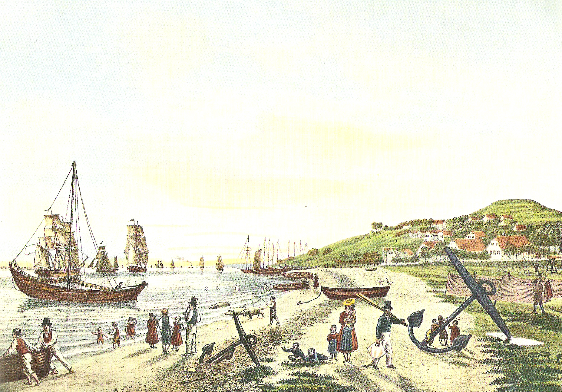 Hamburg - Blankenese 1827